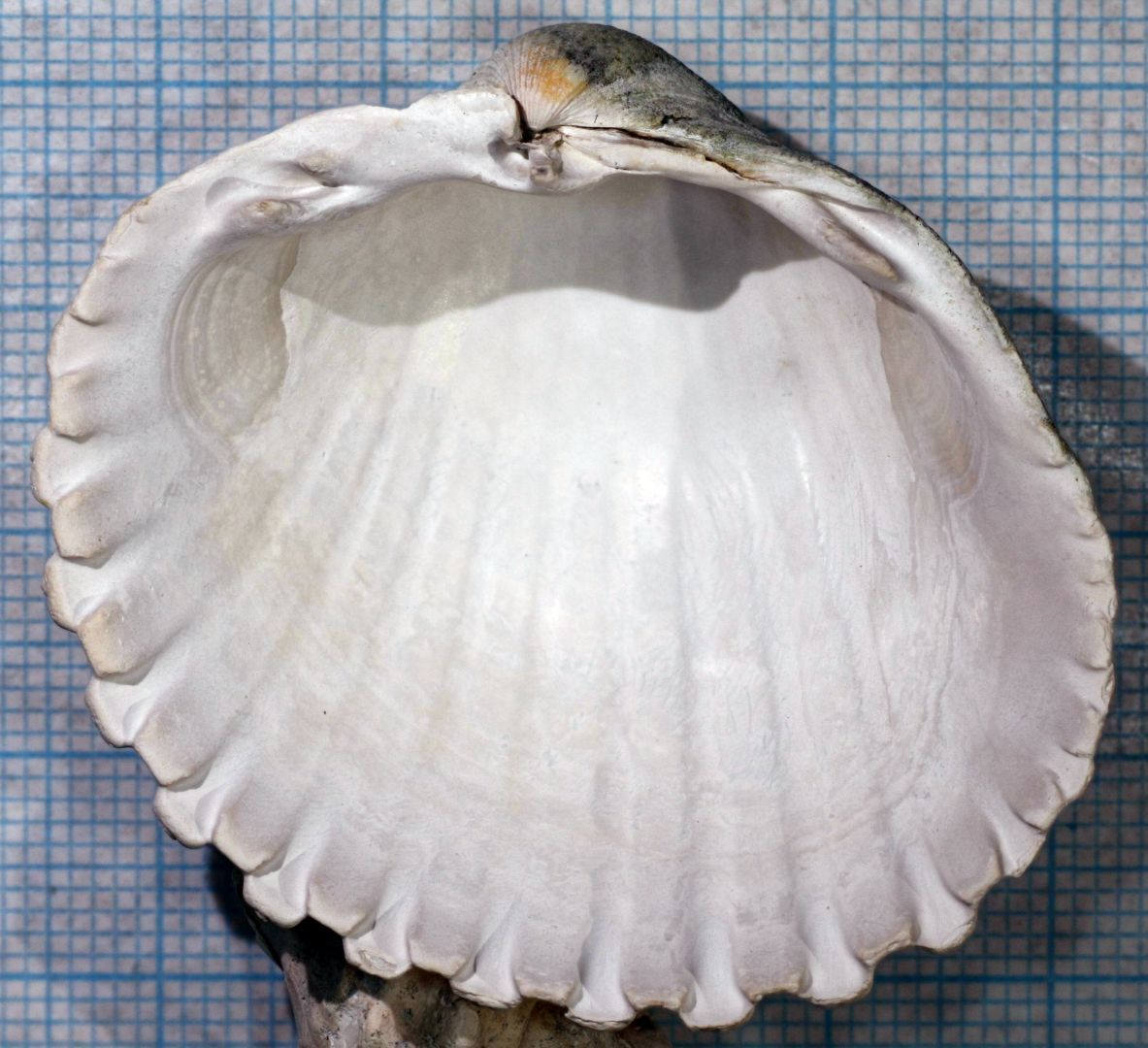 Pigghjerteskjell Acanthocardia echinata